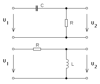 Česky: Pasivní derivační článek